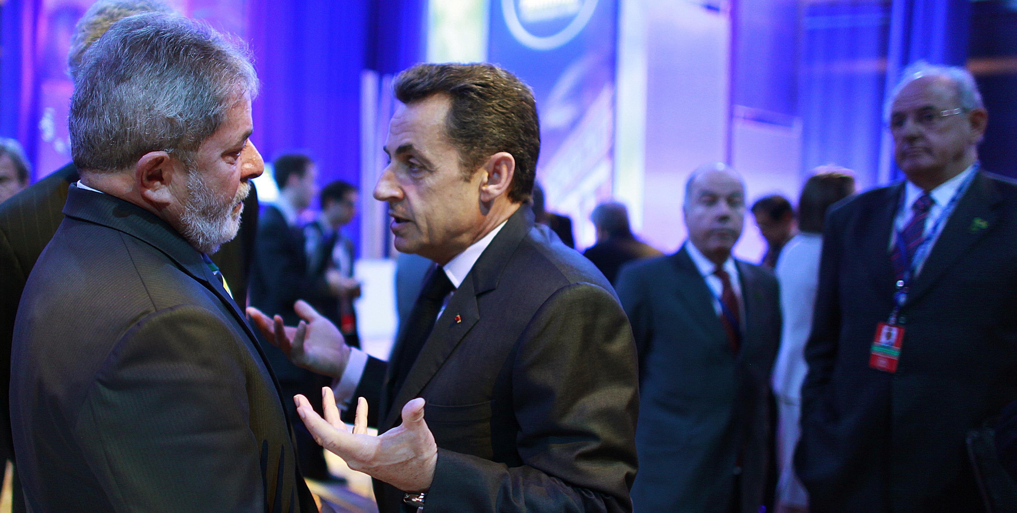 Washington (EUA) - Presidente Lula e o presidente da França, Nicolas Sarkozy, conversam durante a Cúpula de Segurança Nuclear (Ricardo Stuckert/PR)